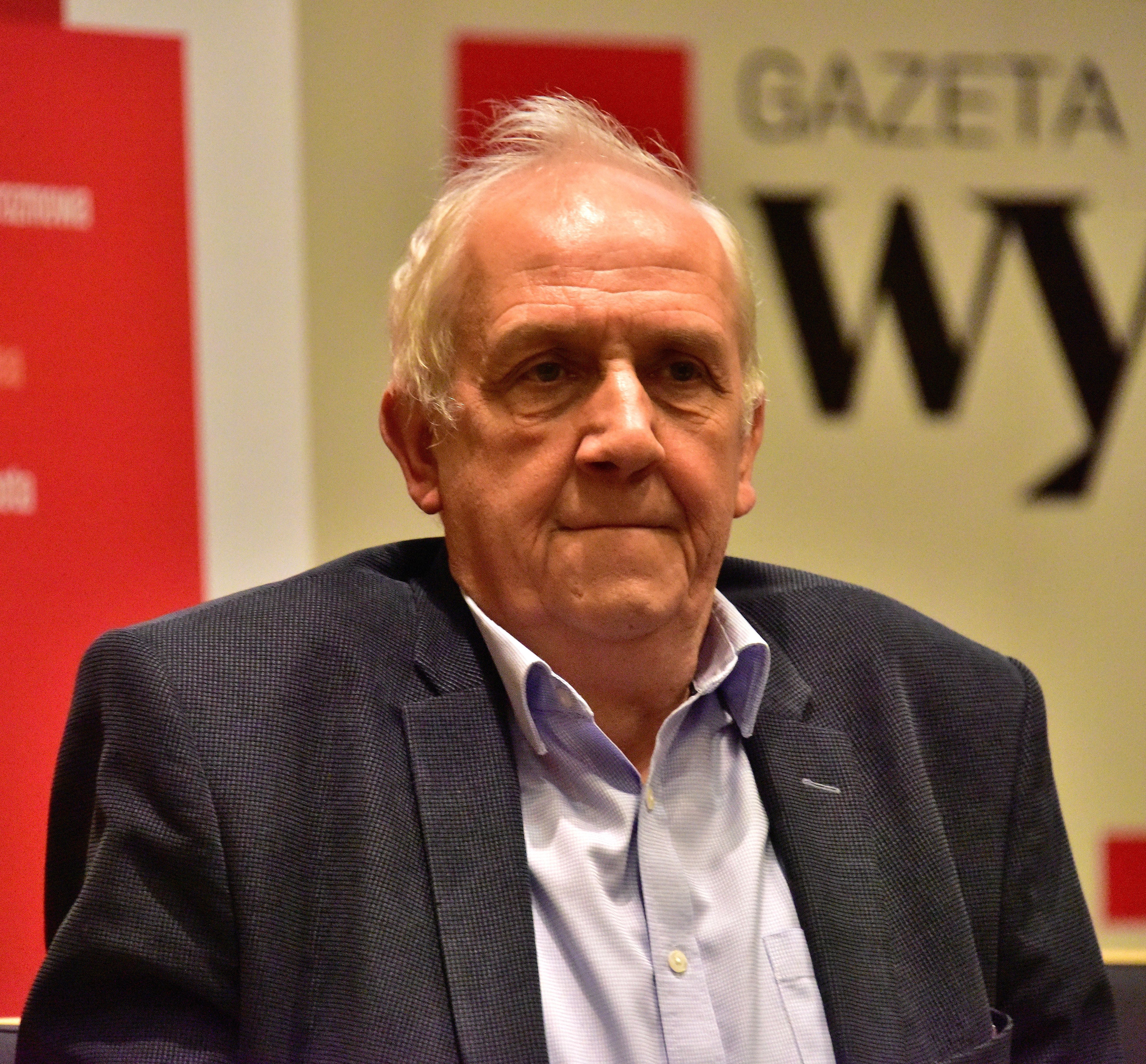 Prof. Andrzej Friszke podczas debaty Okrągły Stół - 30 lat później w redakcji "Gazety Wyborczej" przy ul. Czerskiej 8/10 w Warszawie